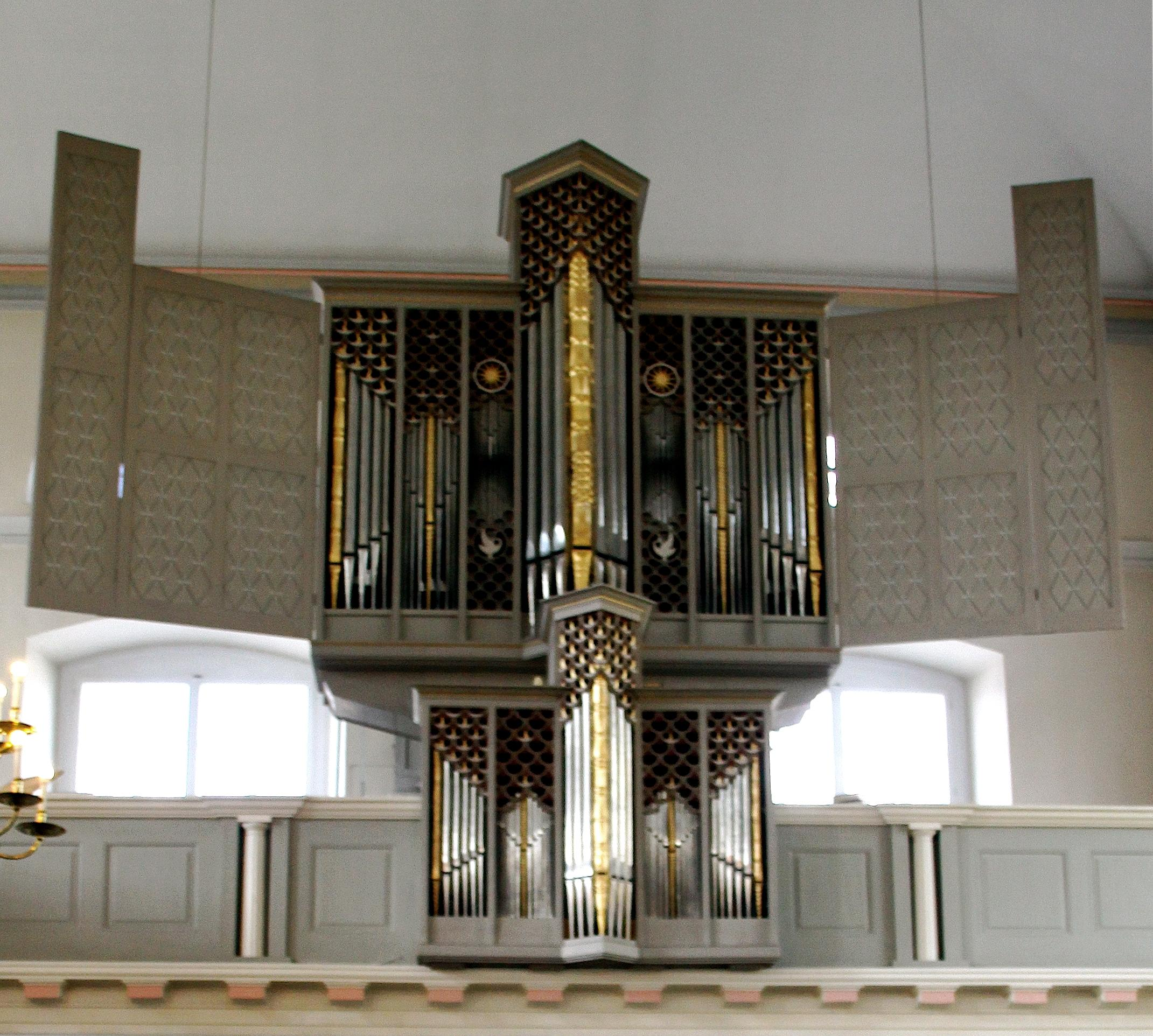 Orgel der Lambertikirche Aurich